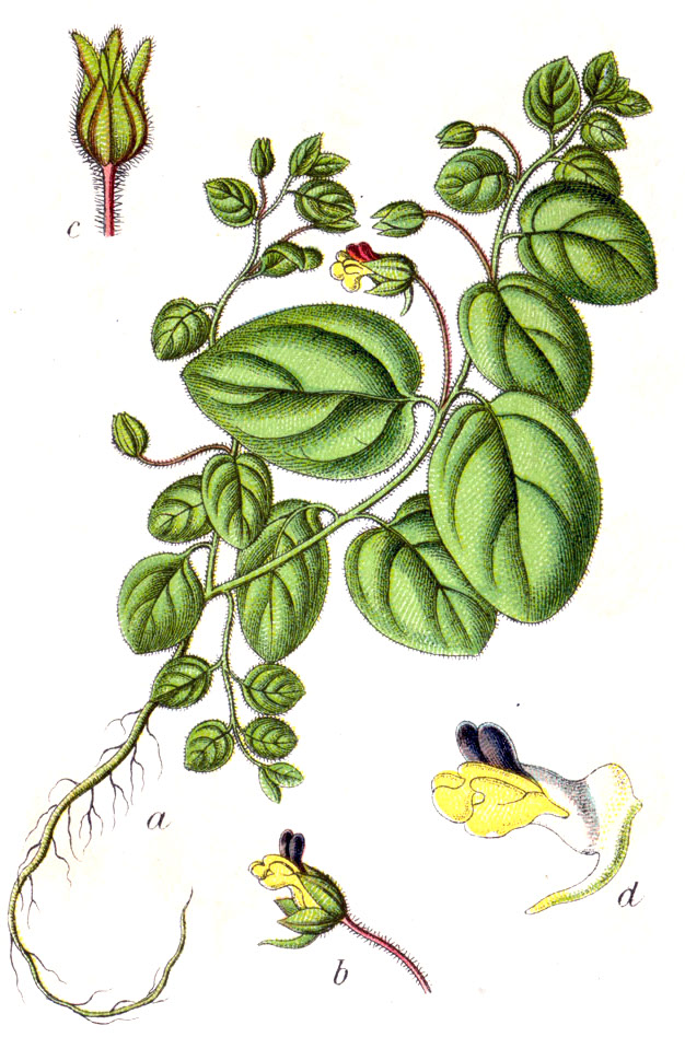 Kickxia spuria subsp. spuria, syn. Antirrhinum spurium L. Original Caption Eiblättriges Leinkraut, Antirrhinum spurium